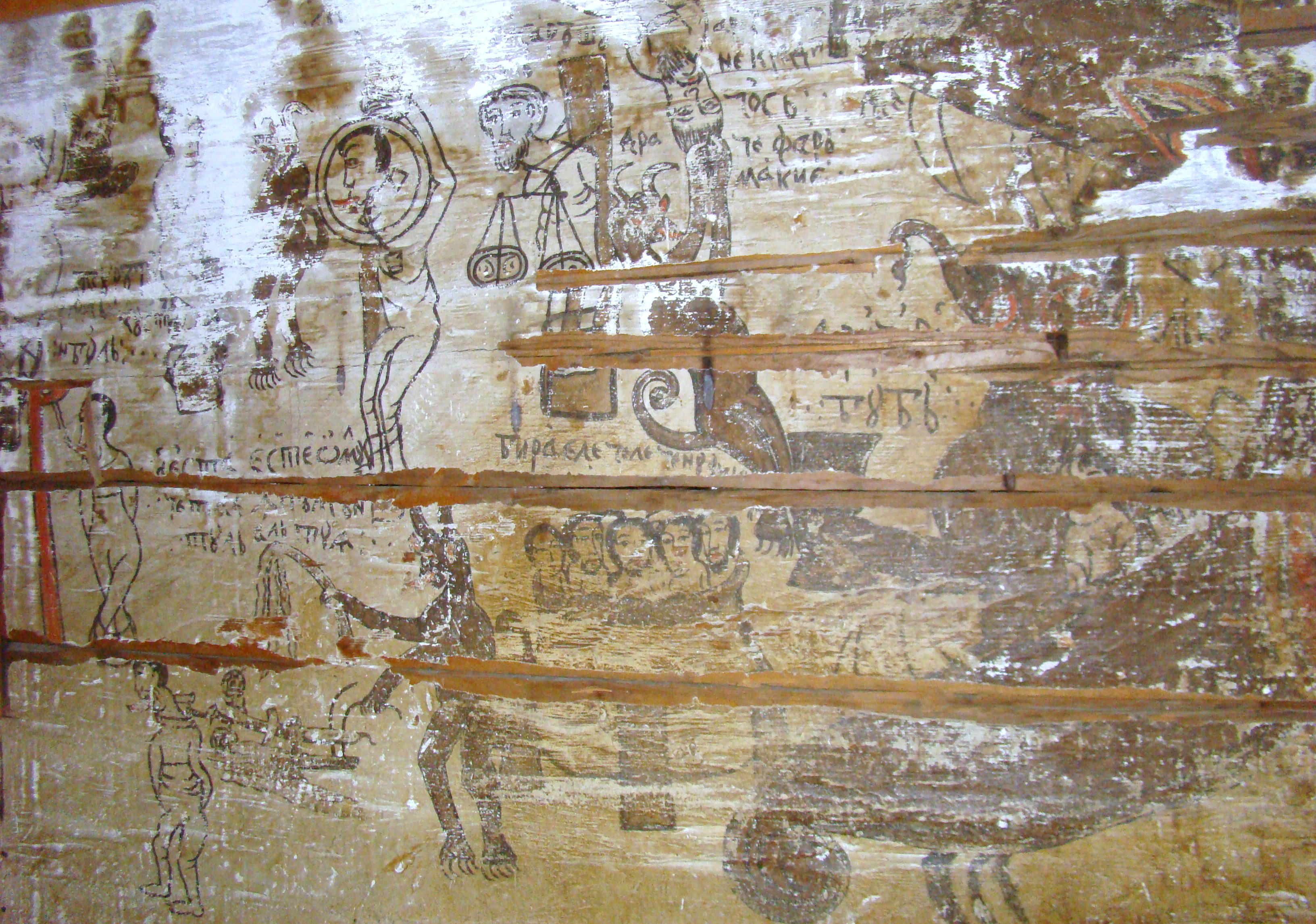 Biserica de lemn din Someșu Rece, județul Cluj